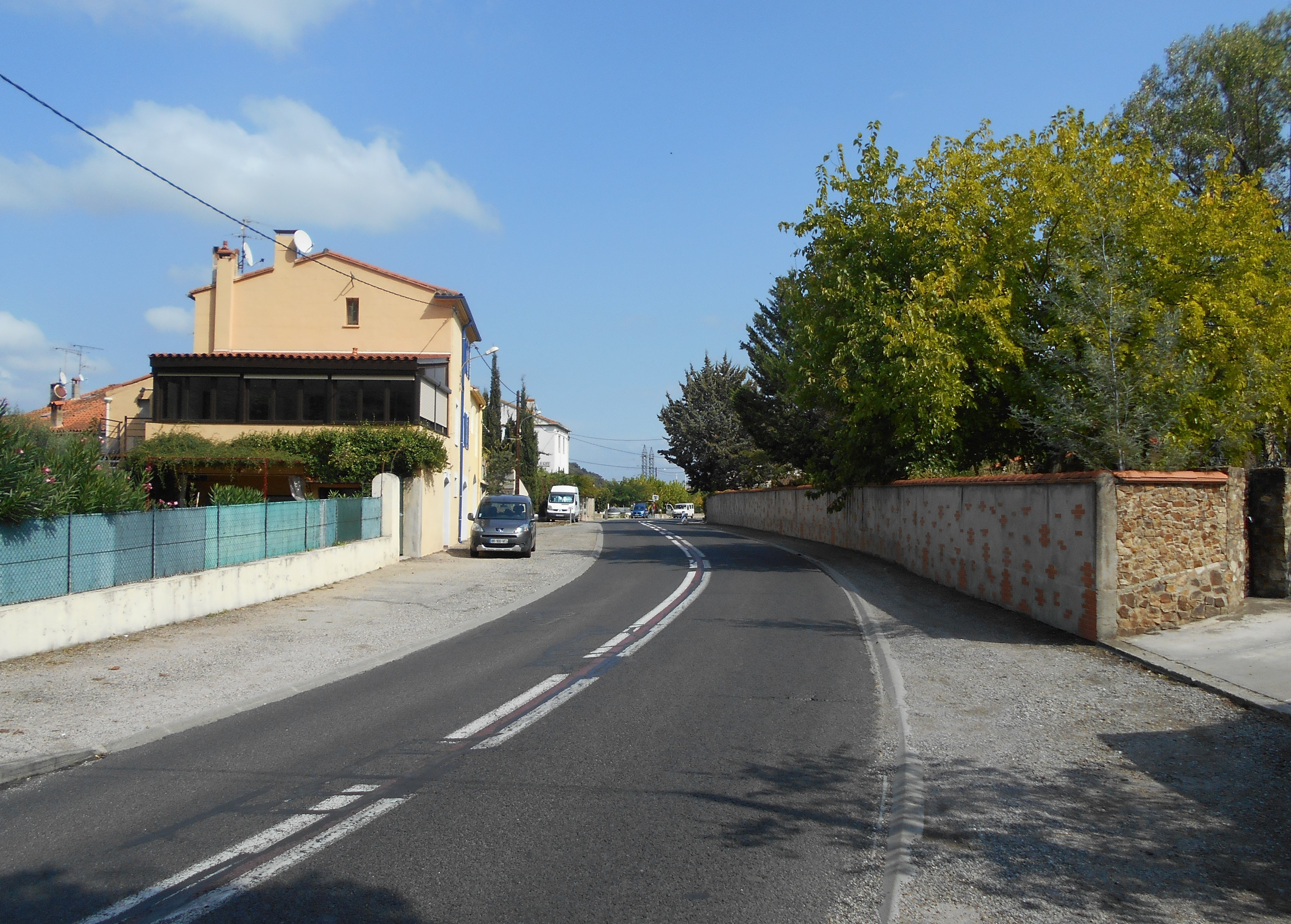 La Cabanassa. Reiners